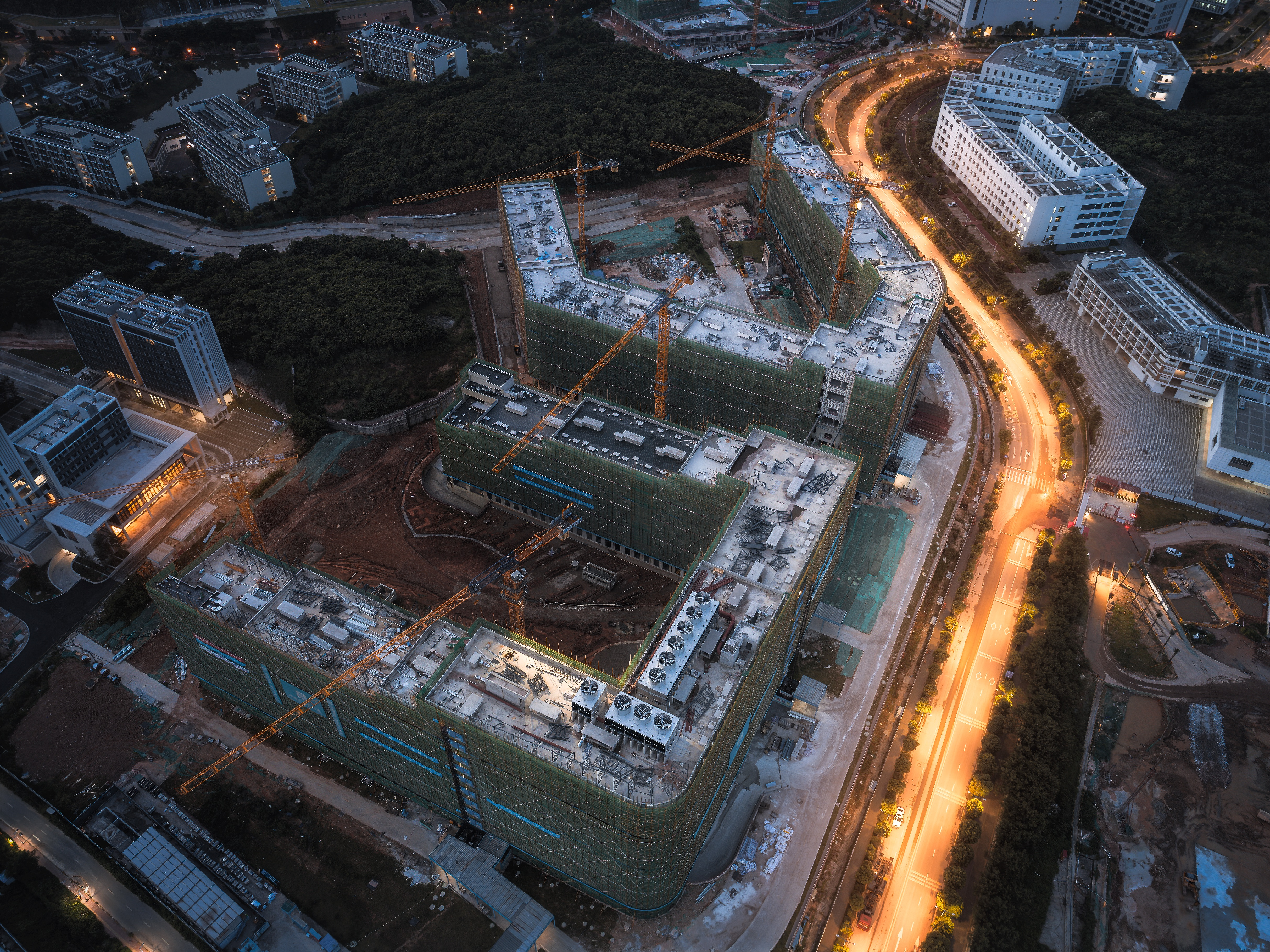 正在建设中的南方科技大学工学院大楼